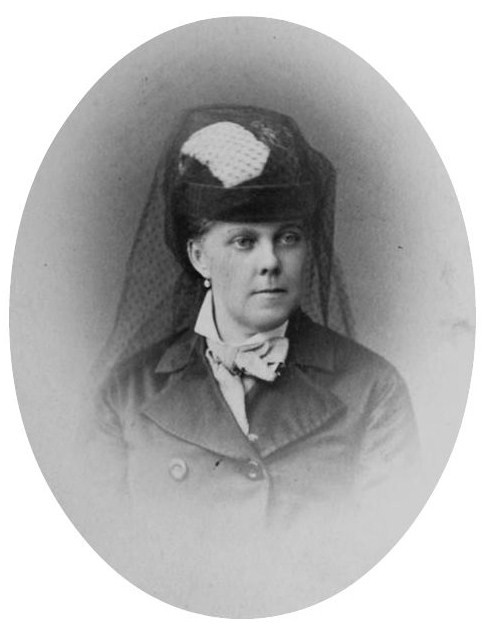 Перфильева Варвара Степановна (ум. 1890)